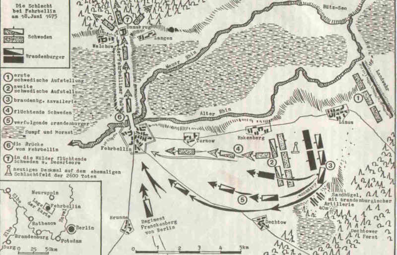 Old map about the Schlacht von Fehrbellin (18 June 1675)